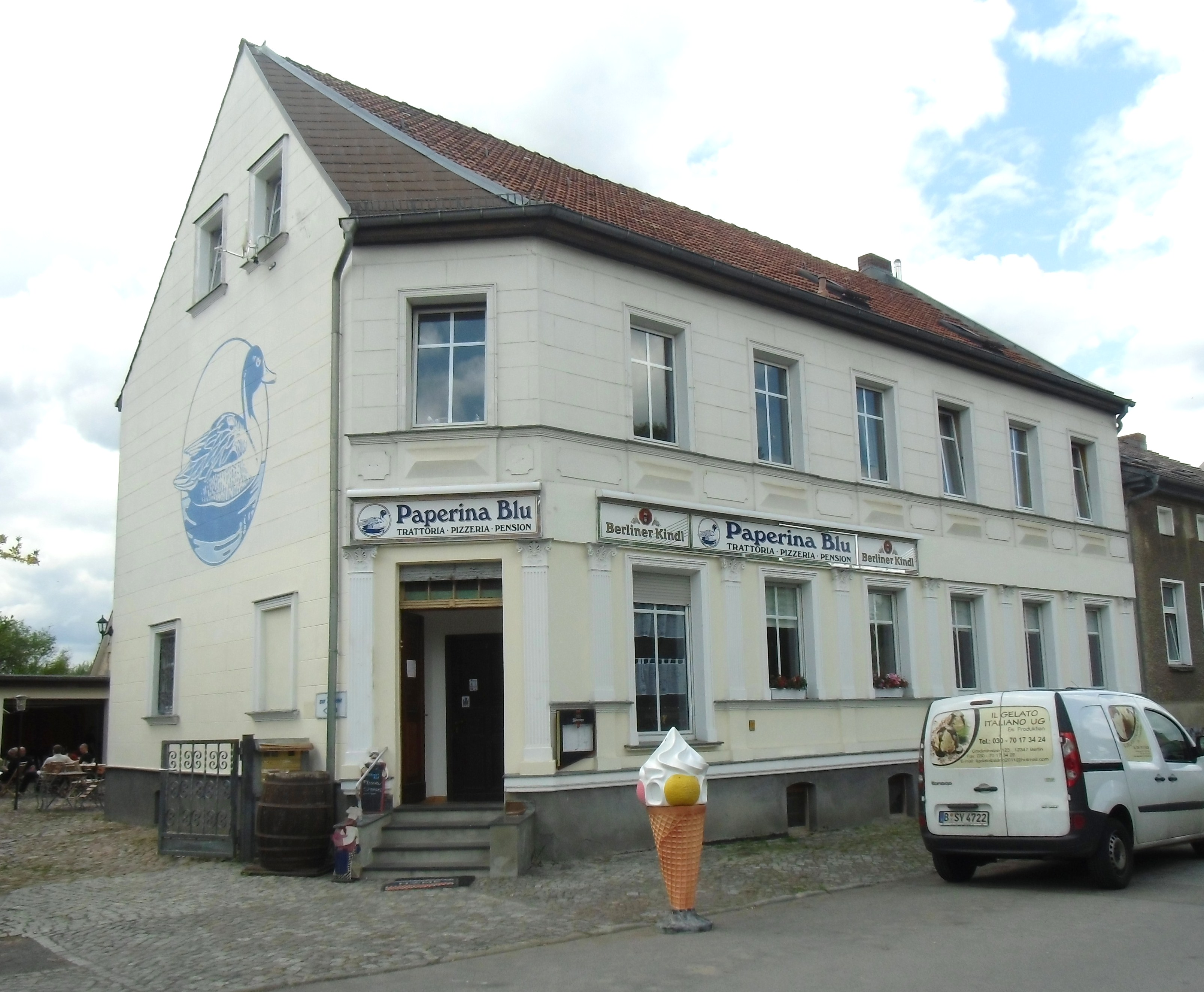 Wohnhaus mit Restaurant (Blaue Ente) im denkmalgeschützten Ortskern von Berlin-Blankenfelde, erbaut um 1885